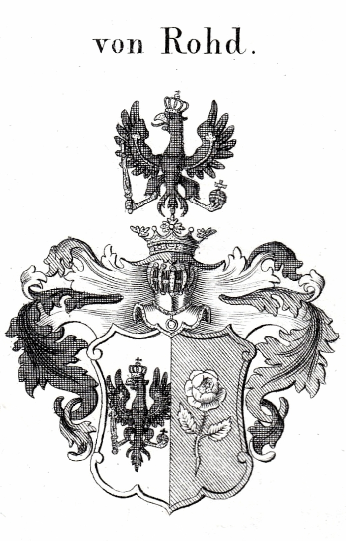 Wappen derer von Rohd, nach dem preußischen Adelsdiplom von 1736.